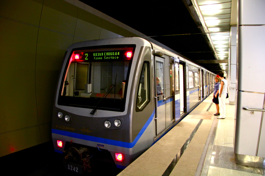 Kazan Metro (Казанский метрополитен)